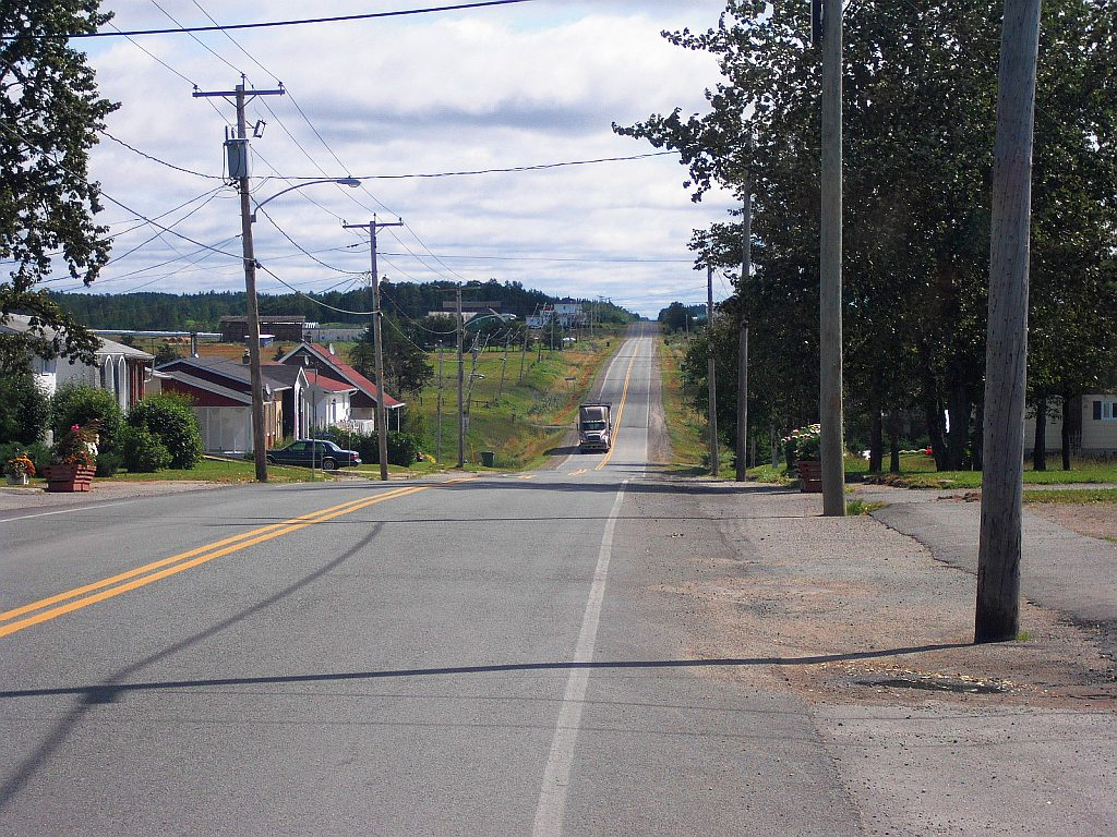 Vue sur la route 390, à Poularies, en Abitibi.